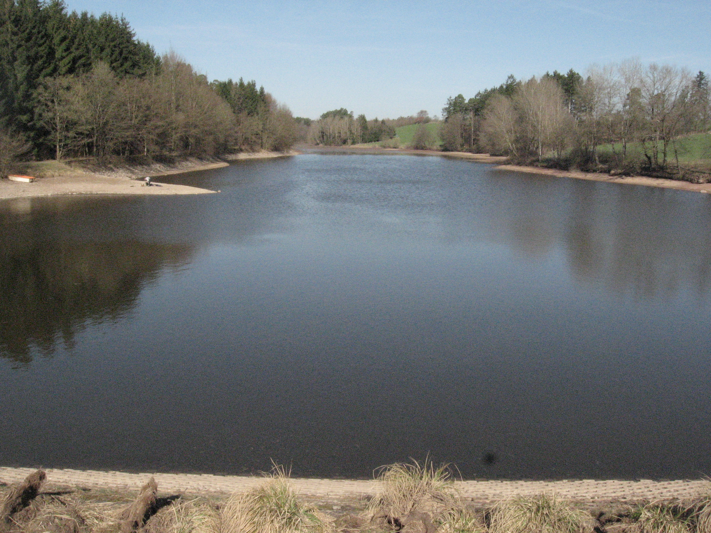 Blick seeaufwärts nach NW von der Dammkrone auf den unteren Teil des vom Rotenbach gespeisten Glasweihers bei Ellwangen-Glassägmühle. Der breite Strandstreifen am Seerand zeigt Niedrigwasser an.